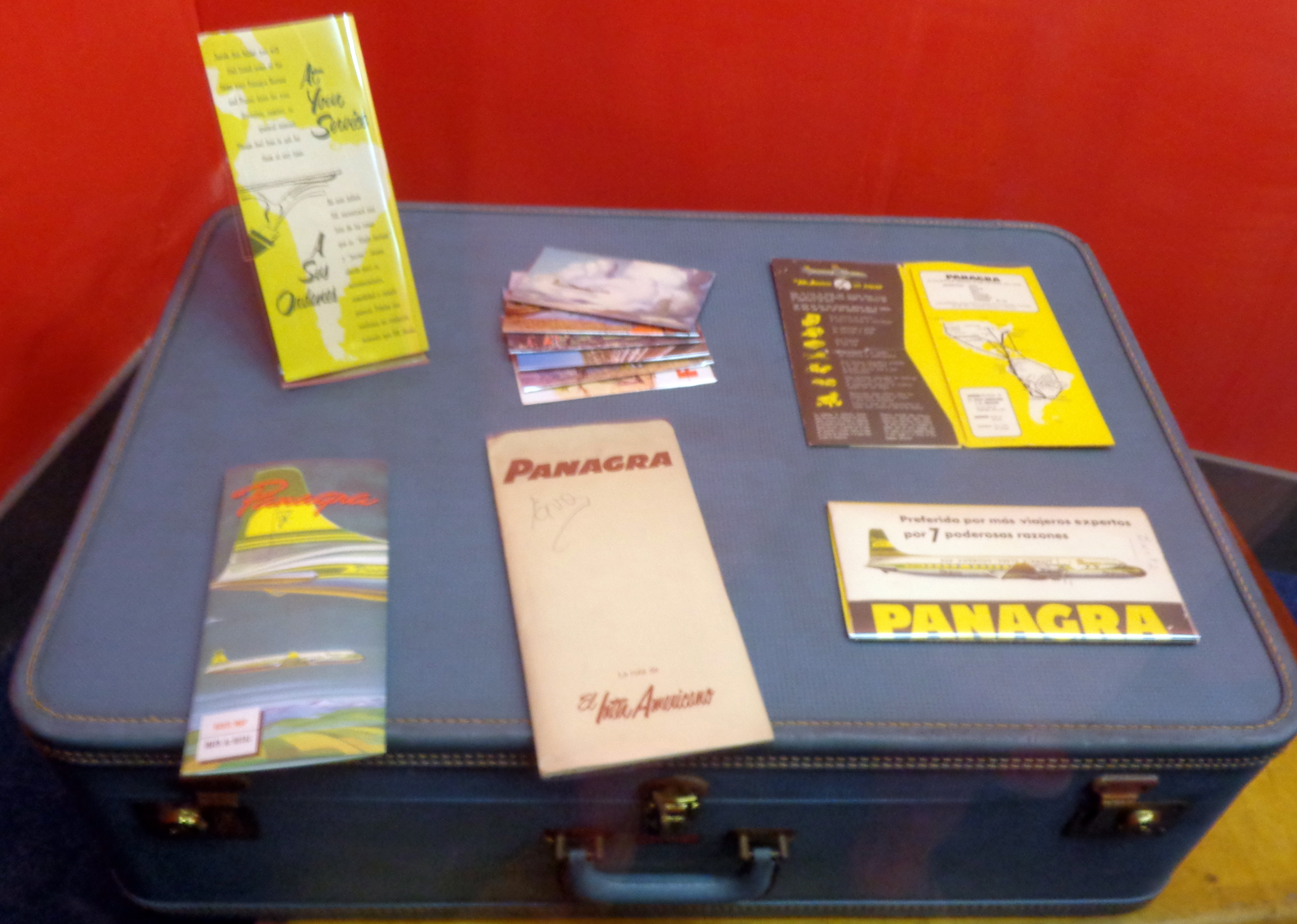 Folletería de Panagra. El Museo Evita se encuentra en la casa realizada por el arquitecto Carabassa, en el Barrio de Palermo, en la Ciudad de Buenos Aires, Argentina.